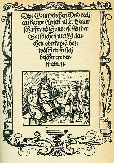 Tapa del los "12 articulos de los campesinos"